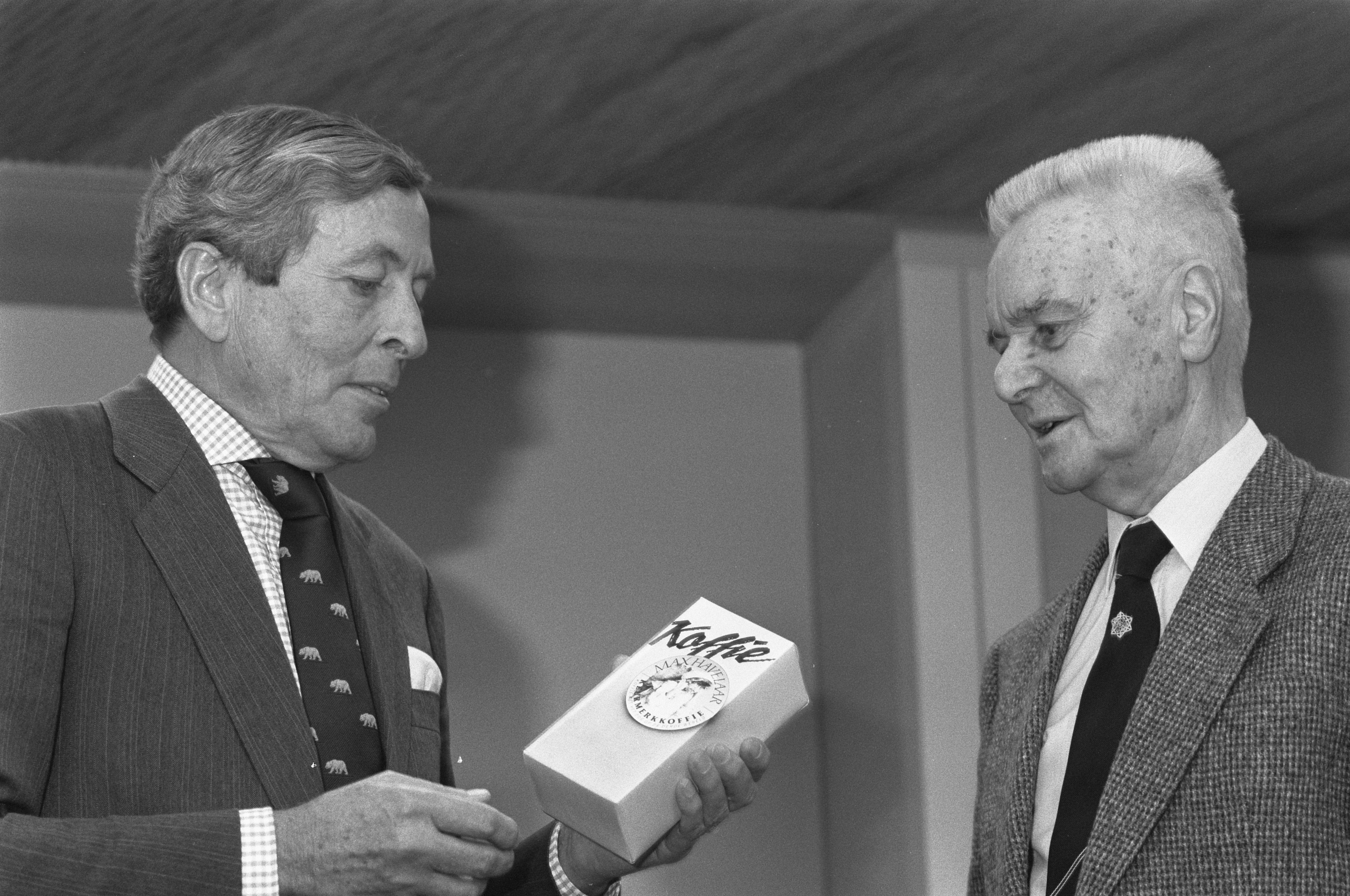 Collectie / Archief : Fotocollectie Anefo Reportage / Serie : [ onbekend ] Beschrijving : Prins Claus ontvangt een pak "Max Havelaarkoffie" van prof. Jan Tinbergen (r) Datum : 15 november 1988 Trefwoorden : koffie, prinsen Persoonsnaam : Claus (prins Nederland), Tinbergen, Jan Fotograaf : Croes, Rob C. / Anefo, [onbekend] Auteursrechthebbende : Nationaal Archief Materiaalsoort : Negatief (zwart/wit) Nummer archiefinventaris : bekijk toegang 2.24.01.05 Bestanddeelnummer : 934-3581